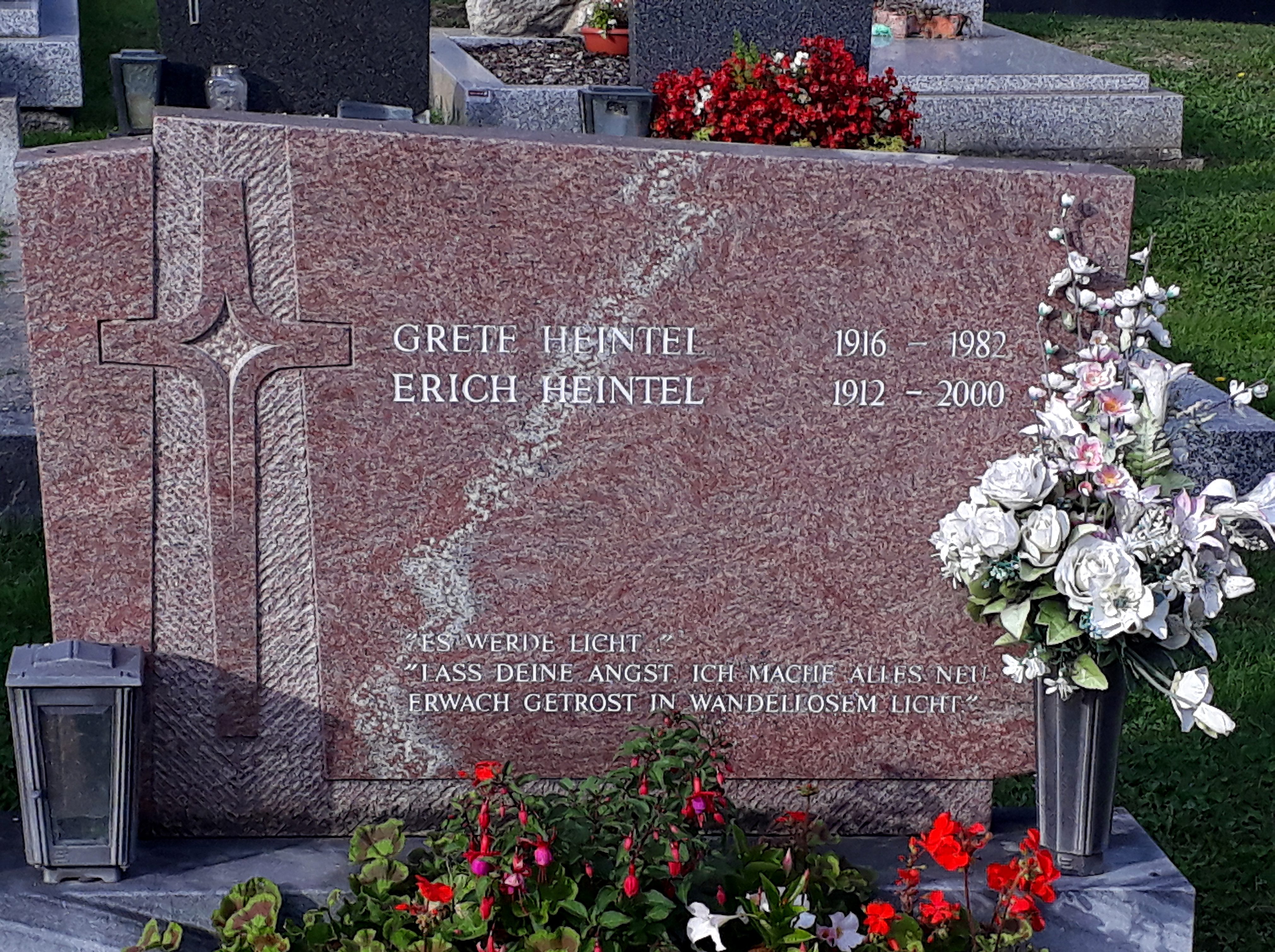 Grab von Erich Heintel am Friedhof von Heiligenstadt in Wien (Univ.-Prof., Philosoph, 29. 3. 1912 - 25. 11. 2000, Bestattung 6. 12. 2000). Grab in Teil A, Gruppe 2 Nr. 25 (links mitte vom Haupteingang). Margarete Heintel, geb. 24. 6. 1916, war seine Gattin aus erster Ehe